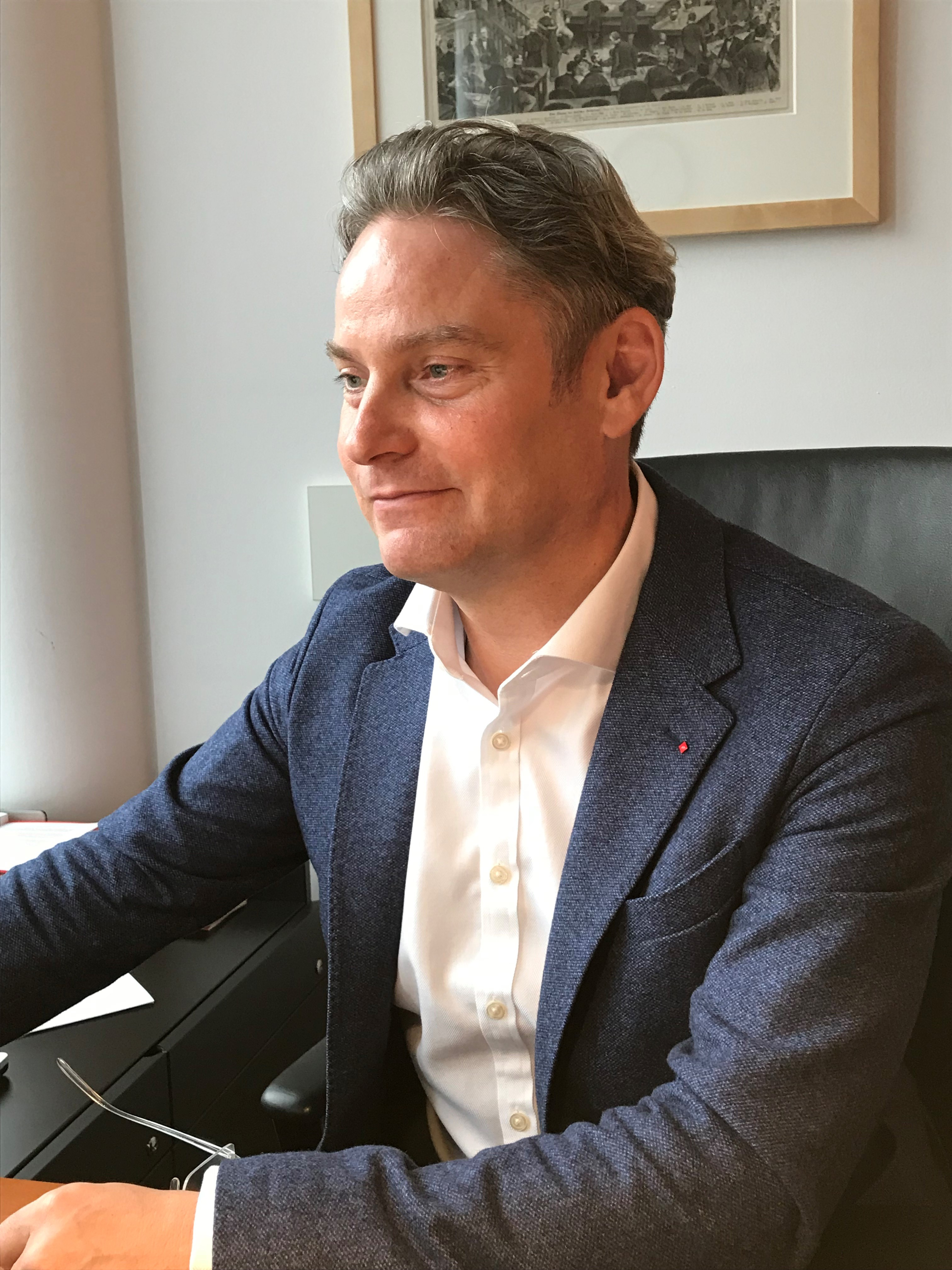 Stefan Zierke